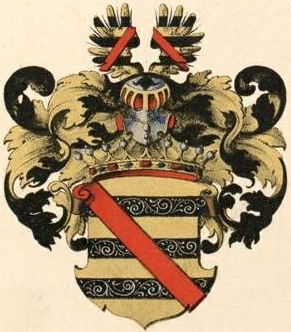 Broel gen. Plateri suguvõsa krahvivapp